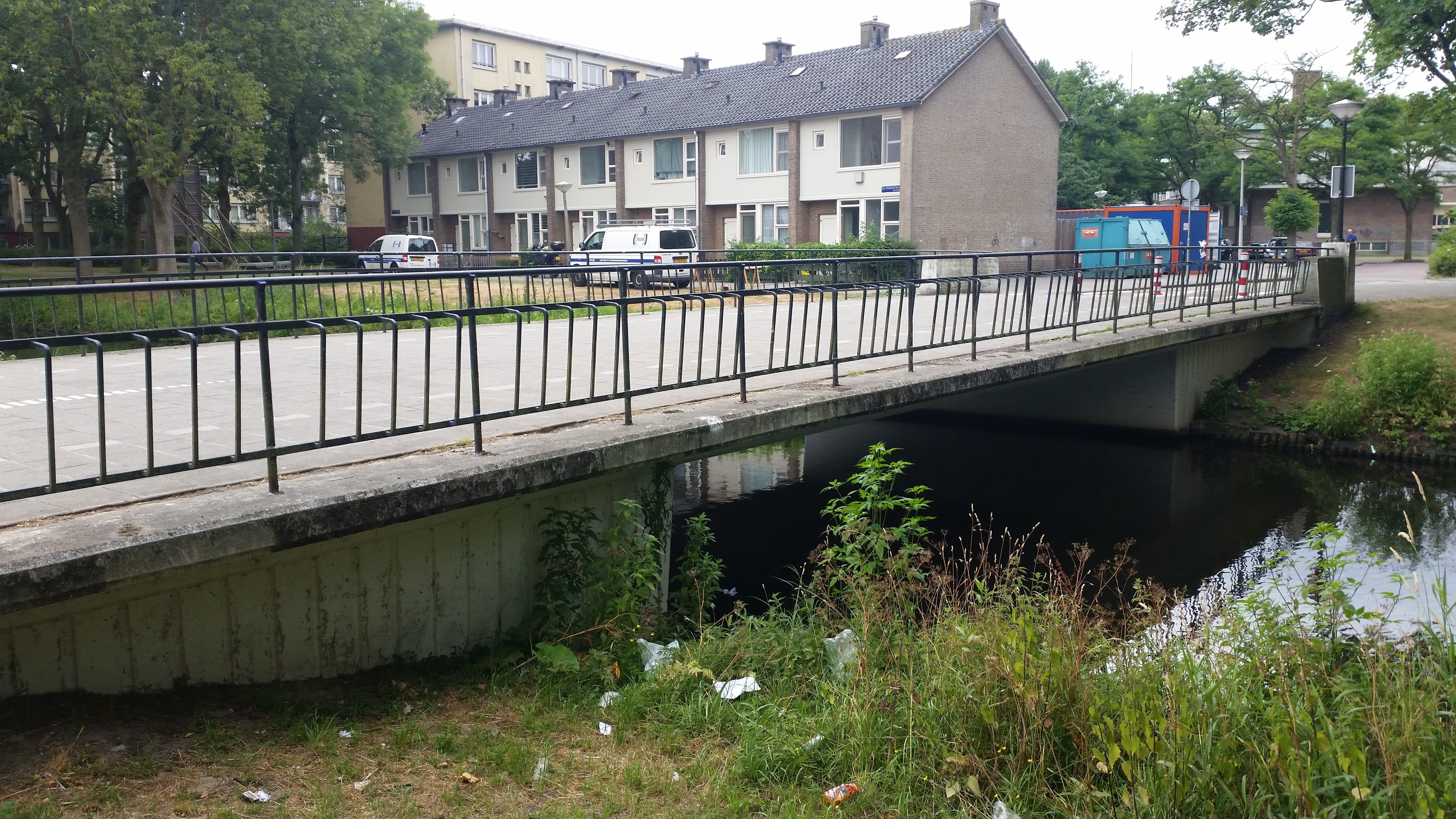 Brug 613 (in Amsterdam), overspanning